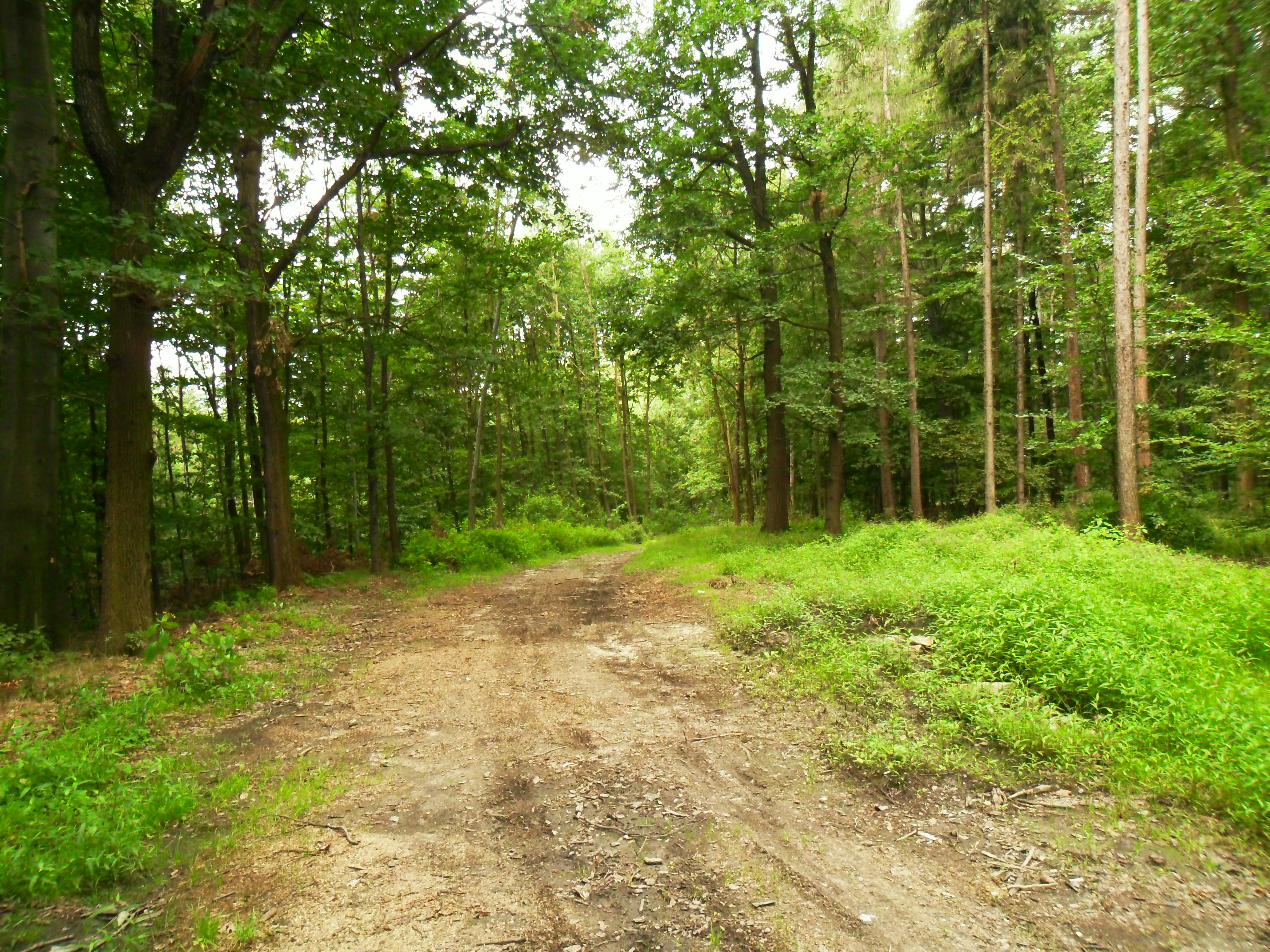 Las Widok w Raciborzu-Brzeziu